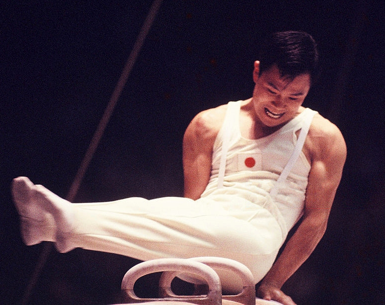 Takashi Ono, 1964 Olympics